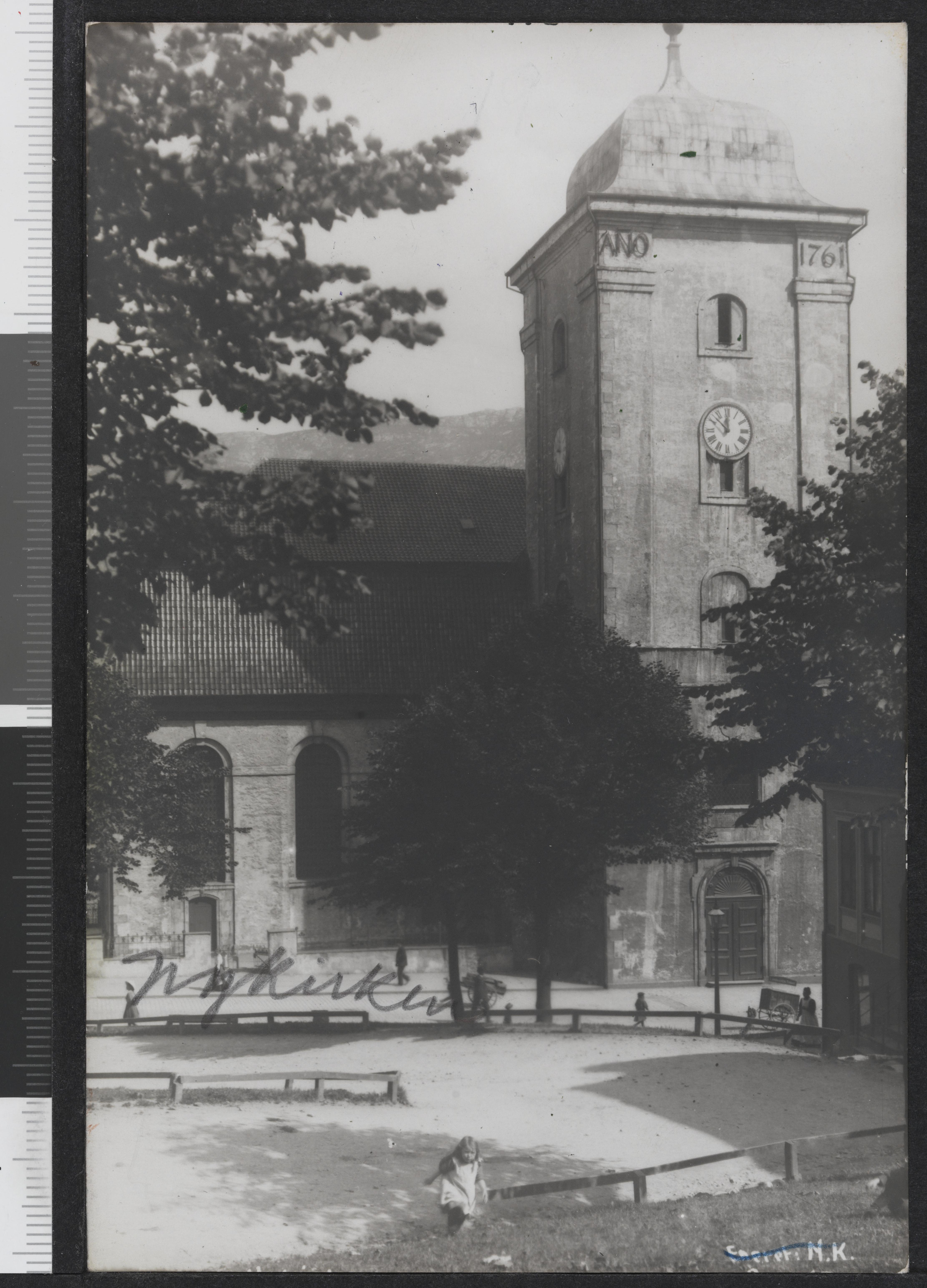 Bildet er hentet fra Nasjonalbibliotekets bildesamling Bergen, Hordaland